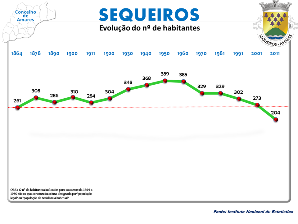 Censo 2011